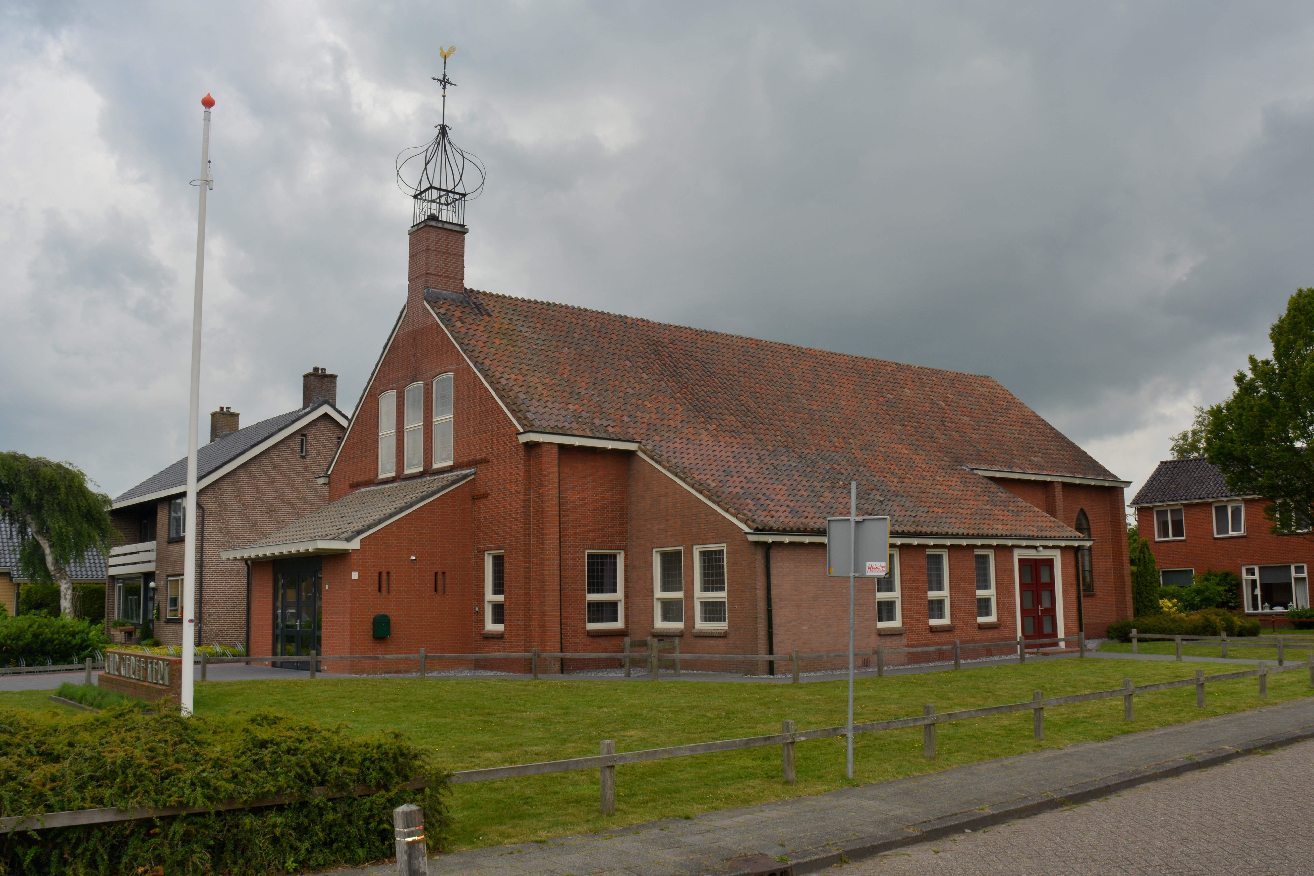 Broeksterwoude, christelijke geref. kerk (Petrusgemeente)